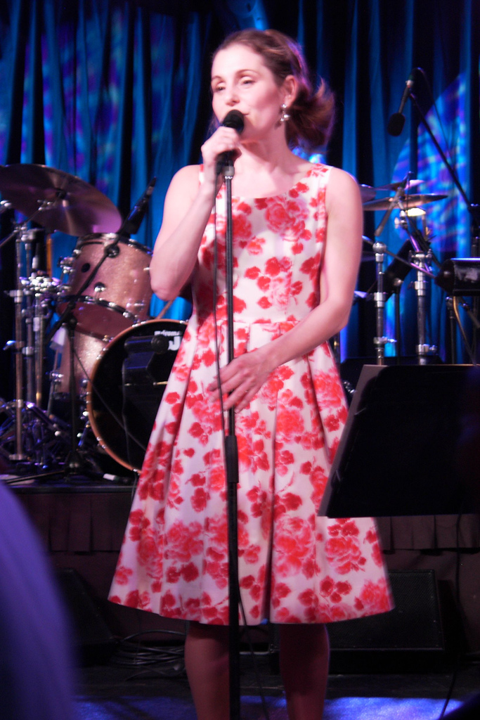 Helen Sjöholm performing with Benny Anderssons Orkester i Minnesota, 2006.